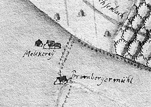 Bromberger Mühle und Melkerei bei der Burg Bromberg: Miniaturen auf der Kieserschen Forstkarte Nr. 98 (gesüdet); Lage: südöstlich von Ochsenbach (Sachsenheim)